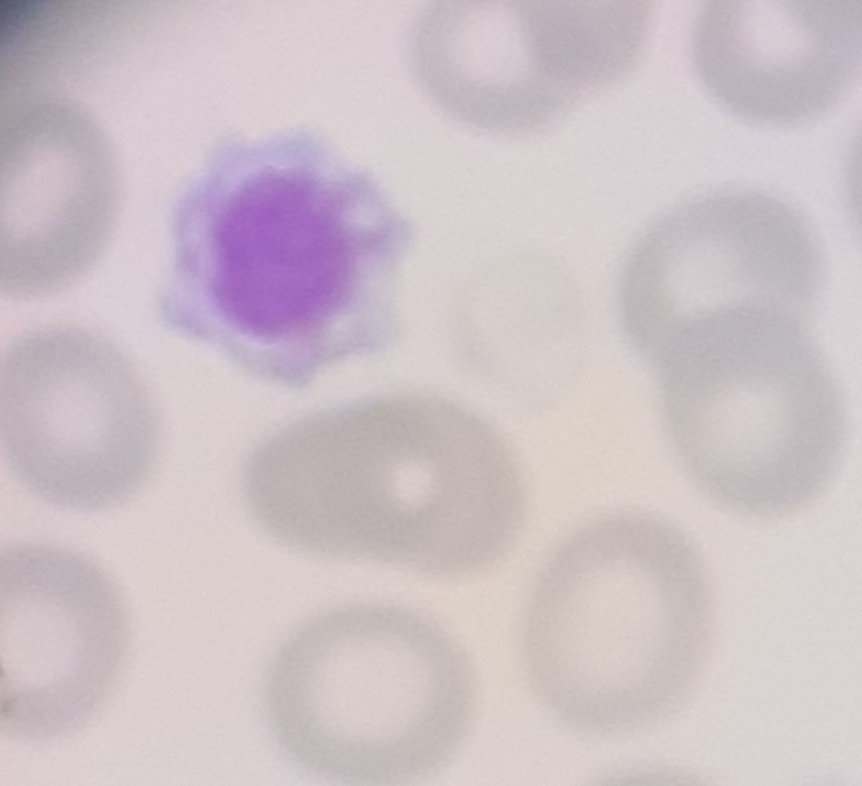 Plaqueta gigante con vacuolización en una Trombocitopenia Esencial, vista con tinción de May-Grünwald-Giemsa modificada para urgencias a 1.000 aumentos